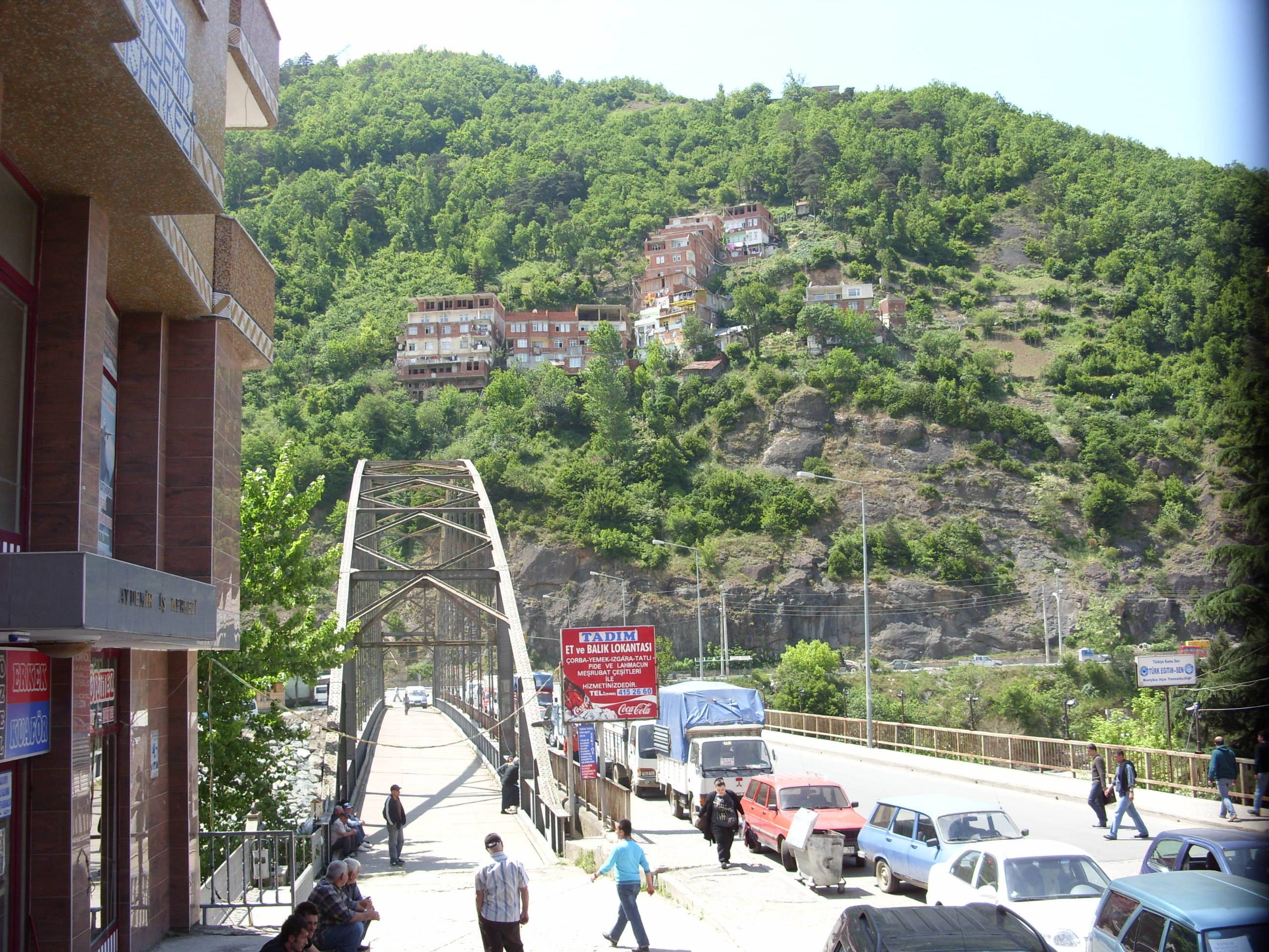 Çoruh üzerindeki köprü - Borçka